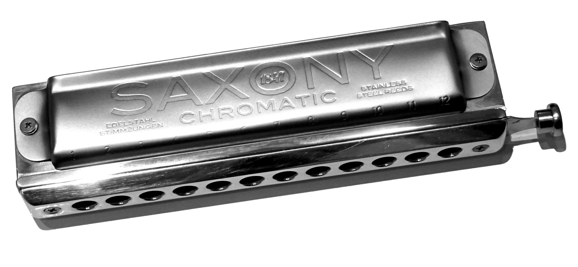 Foukací chromatická harmonika - SAXONY Seydel